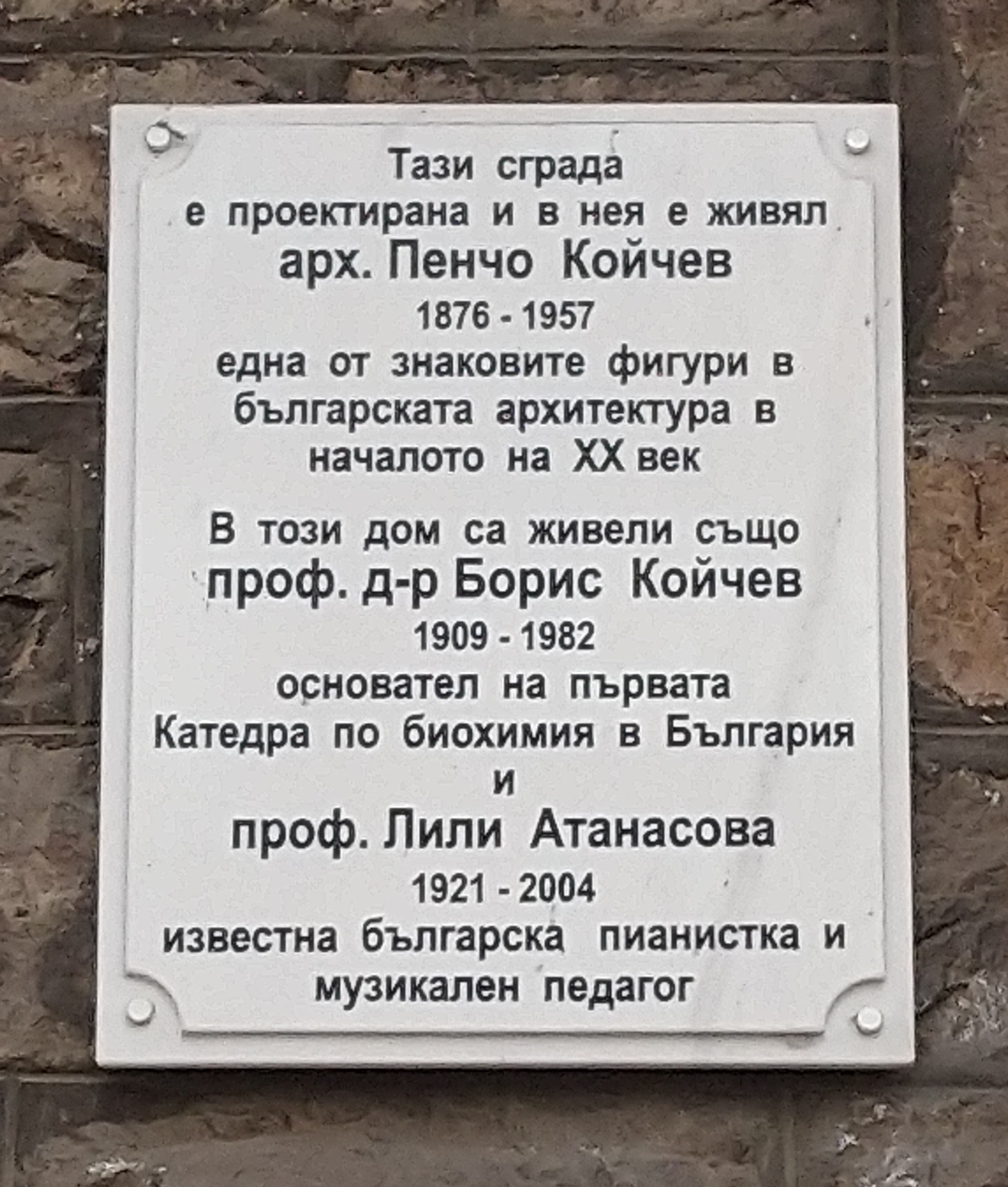 Паметна плоча на арх. Пенчо Койчев, проф. Борис Койчев и проф. Лили Атанасова